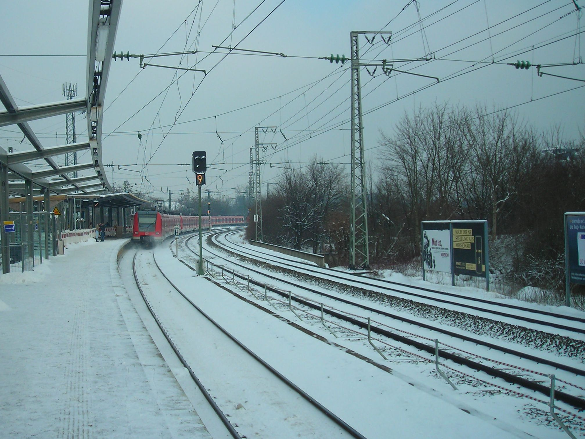 Westkreuz állomás